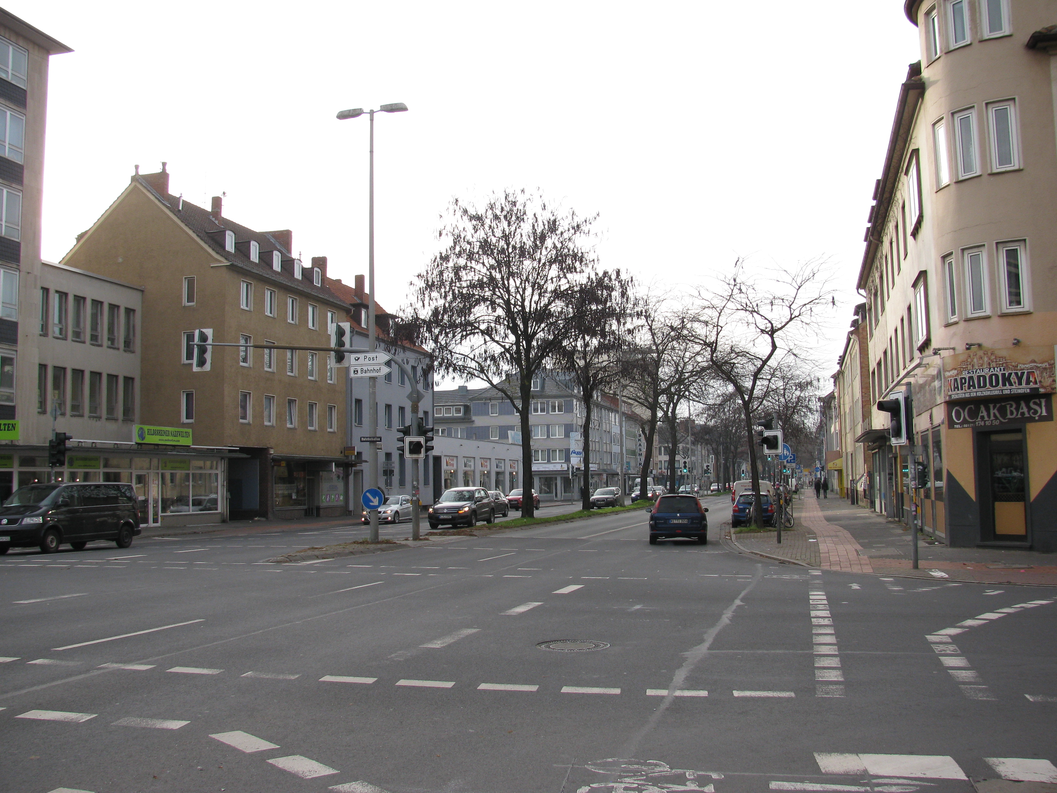 Blick von der Bahnhofsallee in Hildesheim in die Kaiserstraße nach Westen